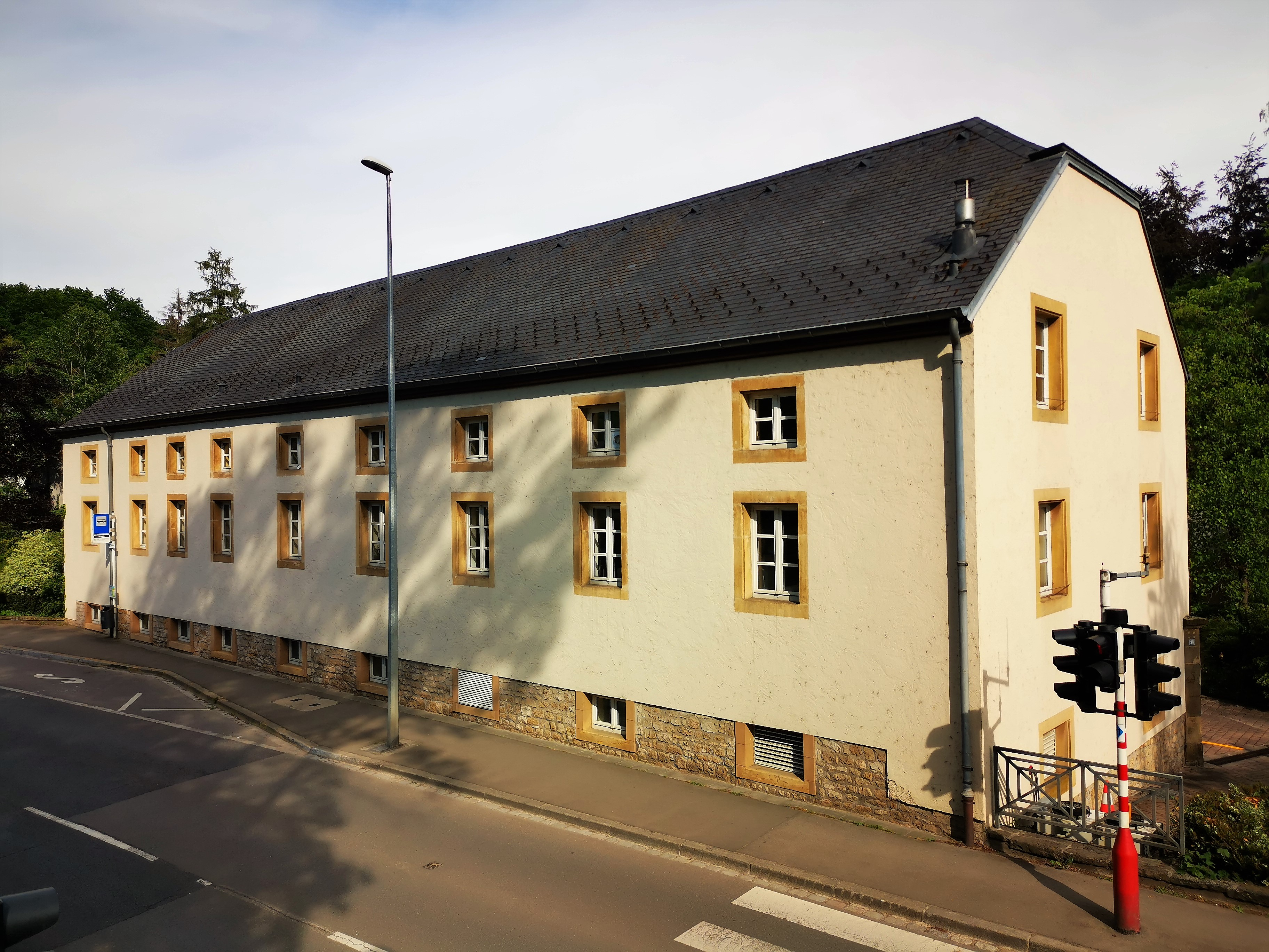 Luxembourg, Bonnevoie. Bâtiment "Kofferfabrick", ancienne fonderie.